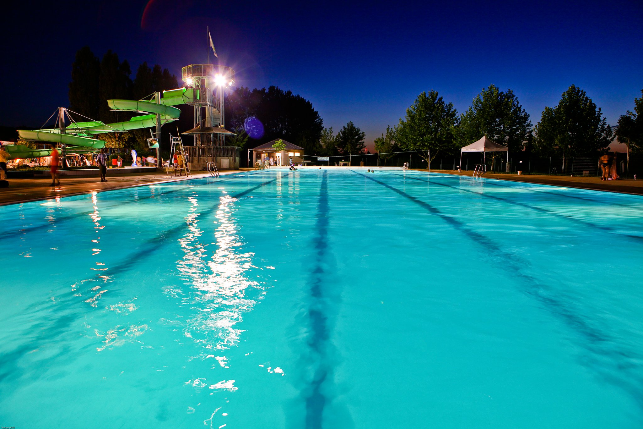 Le parc aquatique Ludolac de Vesoul (Haute-Saône)